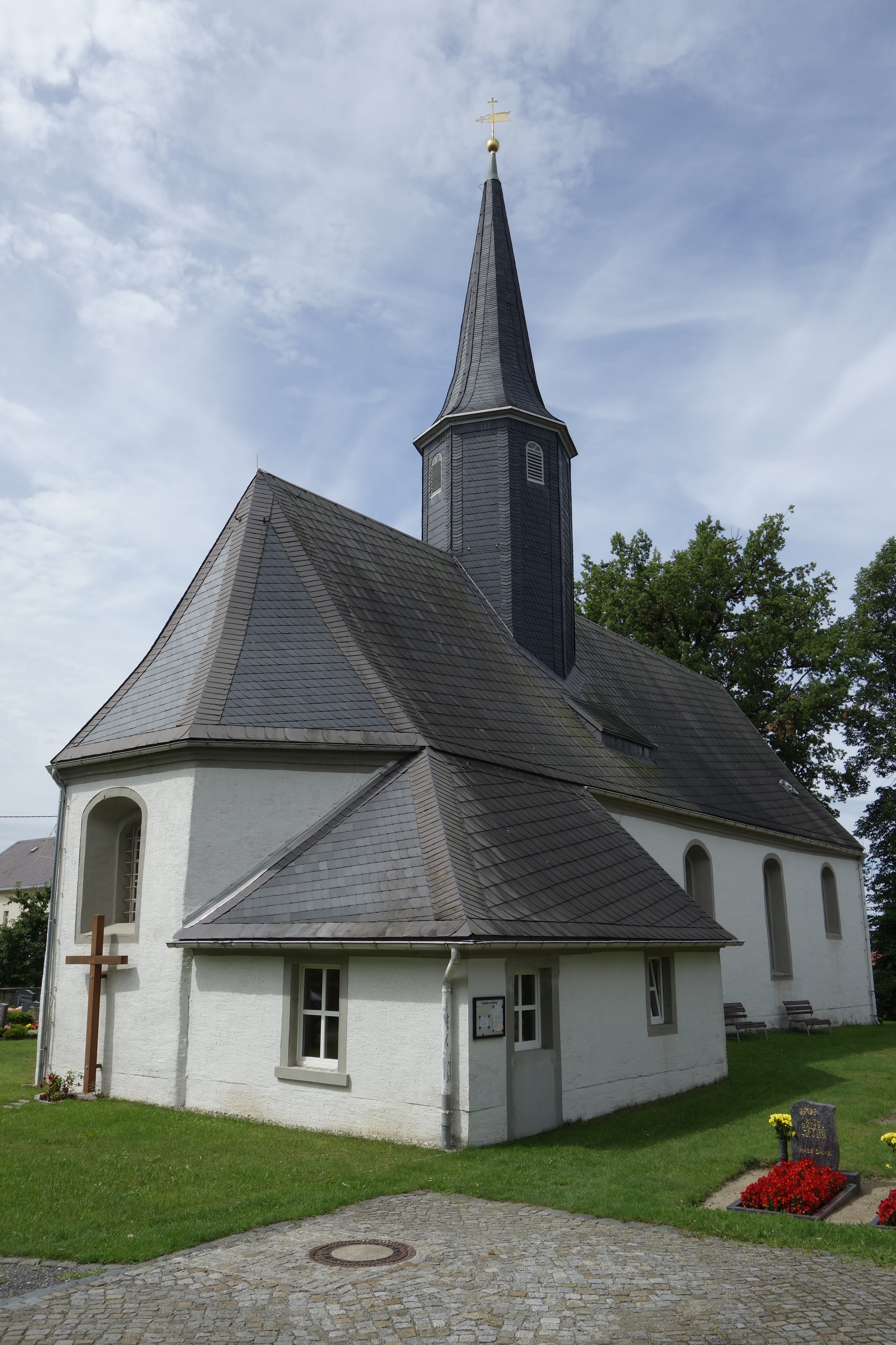 Kirche Höckendorf Juli 2017 (2)